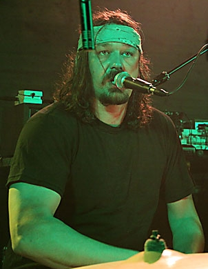 Björn Ottenheim (zZz)